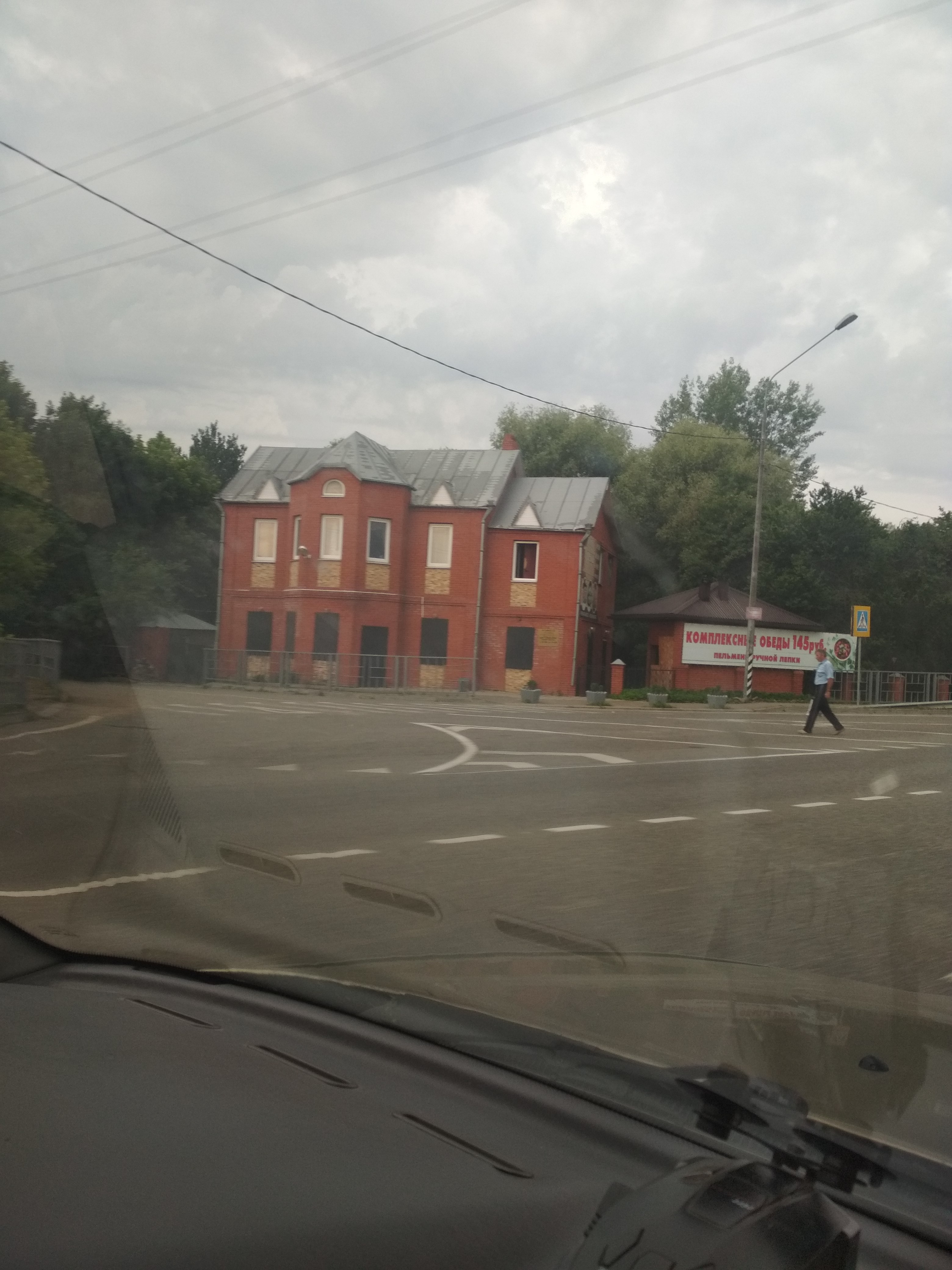 Нохчийн: Ильски